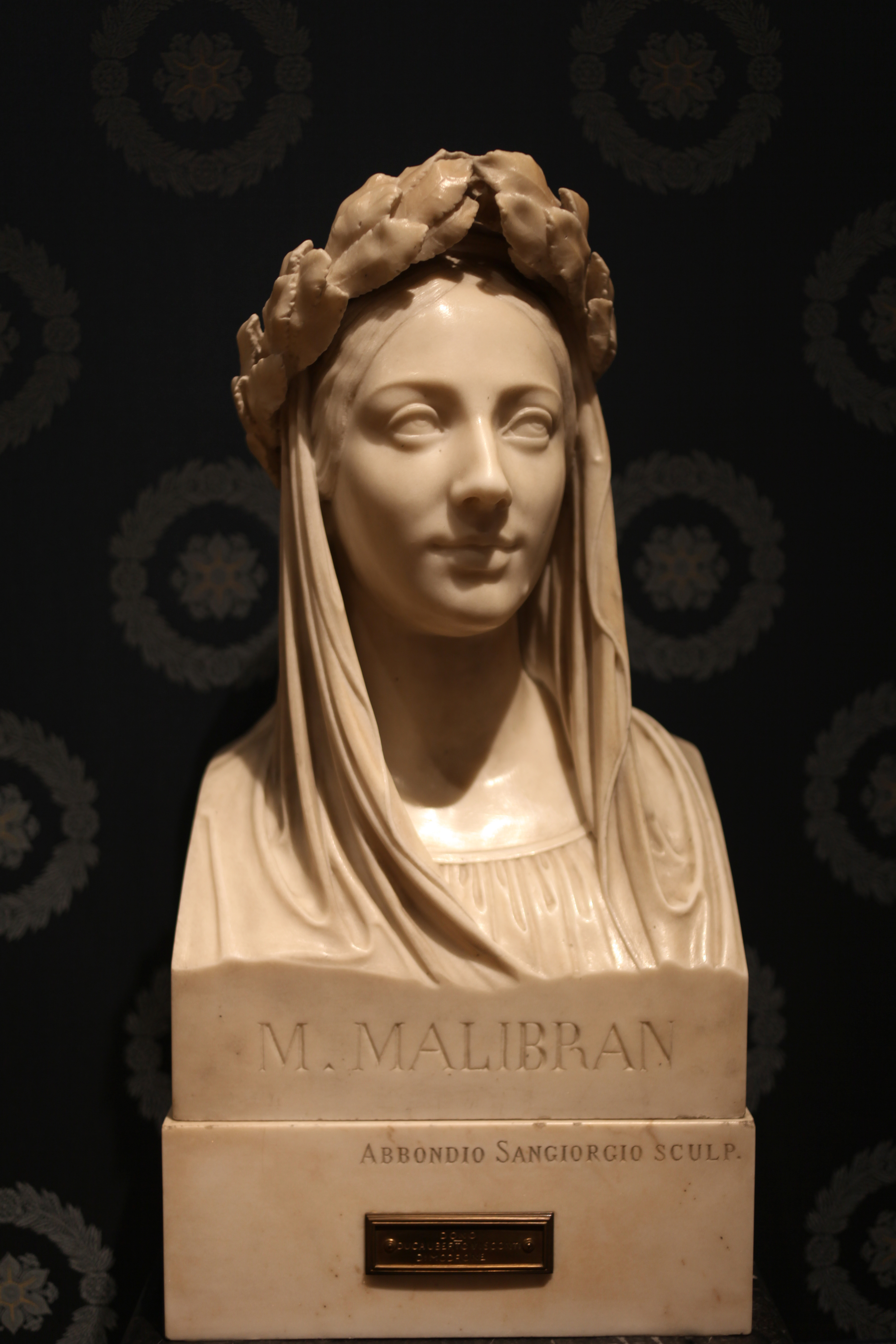 Abbondio Sangiorgio (1798-1879) Busto di Maria Malibran, Museo del Teatro alla Scala